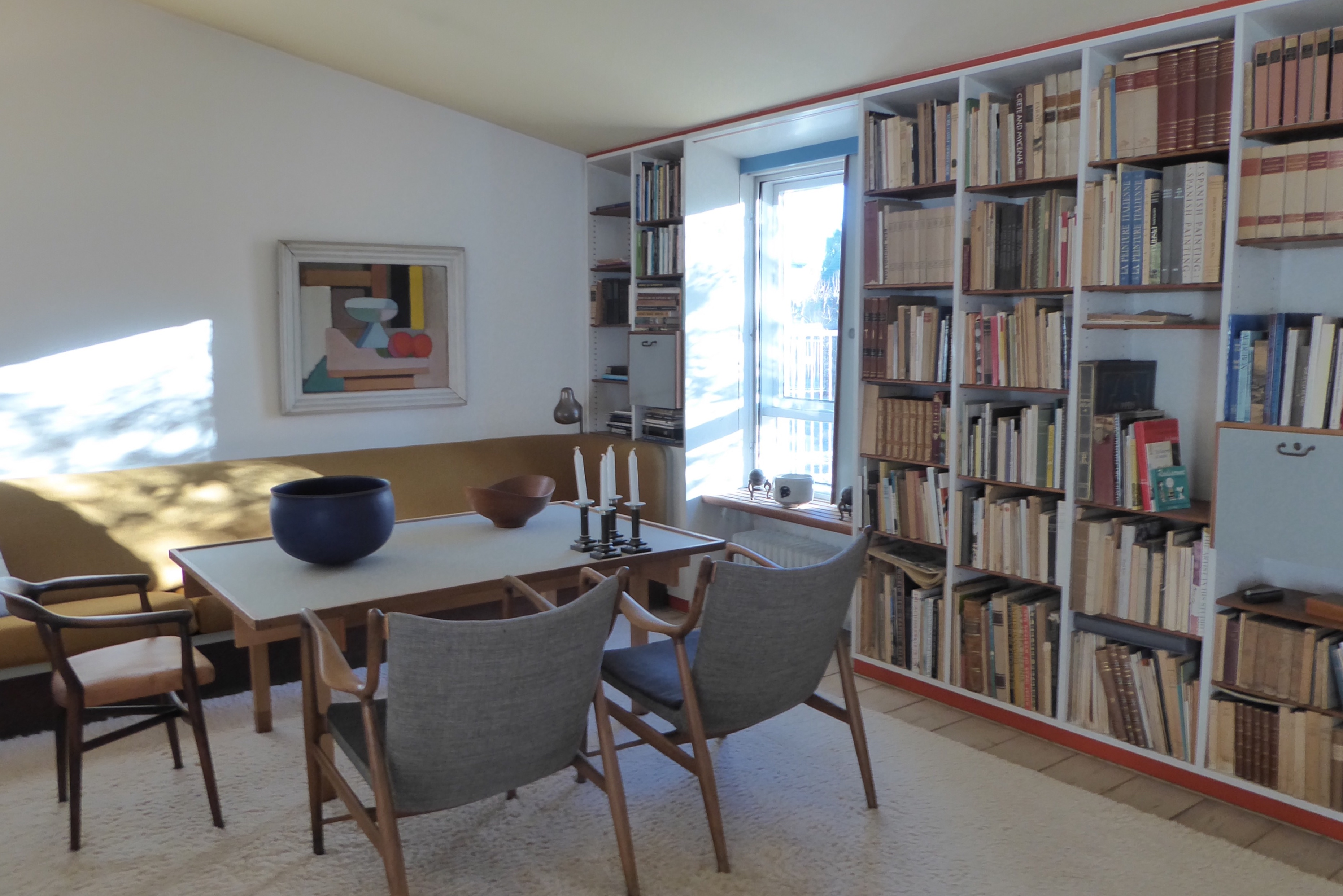 Finn Juhls Hus in Ordrup, Denmark